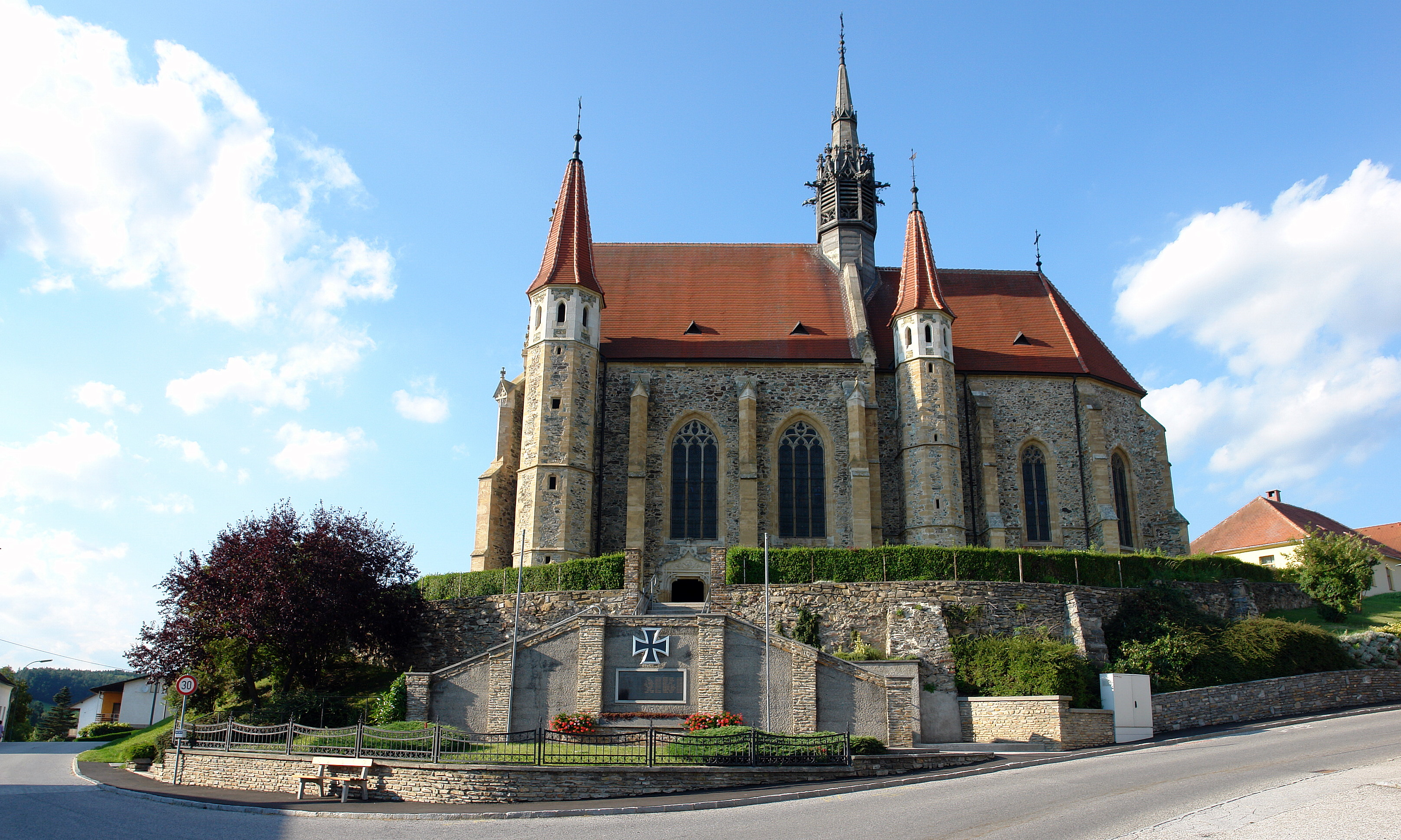 Máriafalva, templom